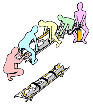 Moulage du matelas immobilisateur à dépression, pompage et mise en place des sangles. Auteur : Christophe Dang Ngoc Chan (Cdang), dessin original numérisé.